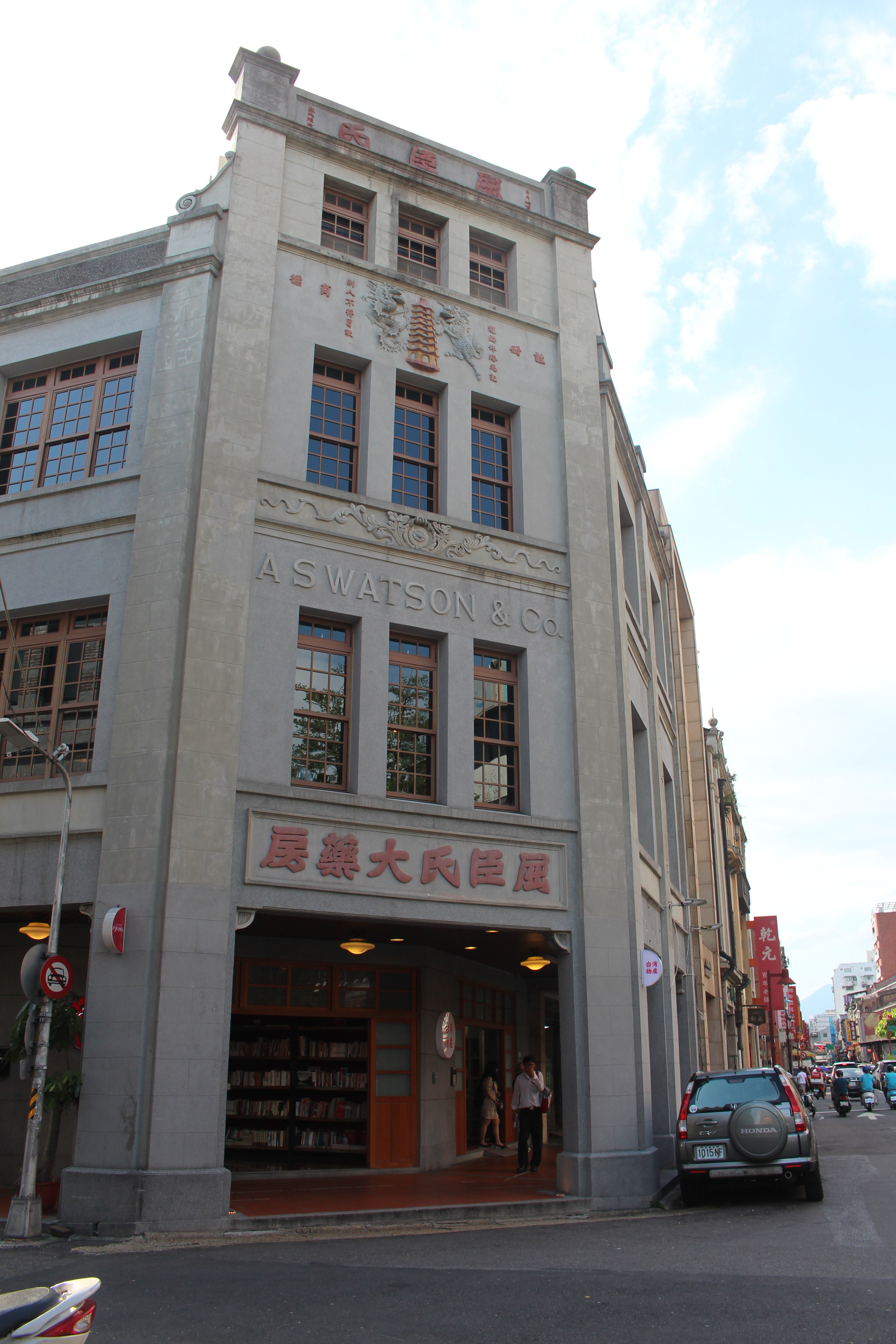 中文（台灣）: 臺北市大同區迪化街屈臣氏大藥房。